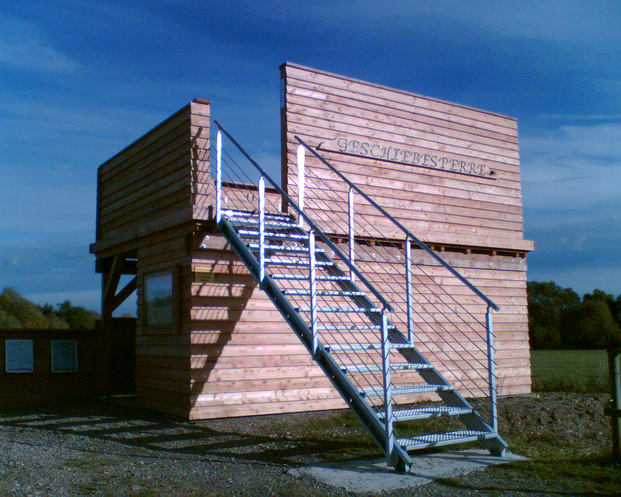 Aussichtsplattform bei Hollenstedt an der Leine, westlich der Northeimer Seenplatte. Die untere Plattform ist barrierefrei, die obere über eine Metalltreppe zugänglich.